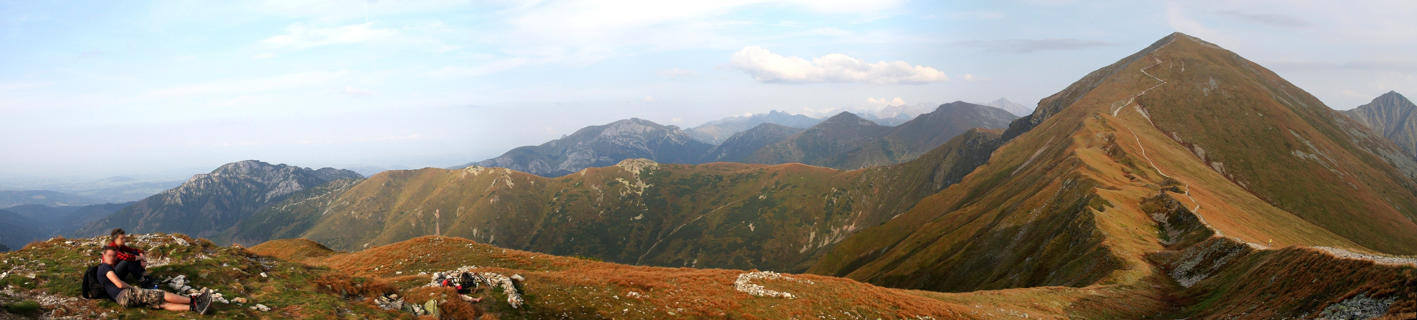 Panorama z Kończystego Wierchu, od lewej: Kominiarski Wierch, grzbiet Ornaku, w głębi Czerwone Wierchy, Przeł. Tomanowa, Wierchy: Tomanowy, Smreczyński, Kamienista, Starorobociański. W kierunku tego ostatniego biegnie wyraźny rów graniowy.